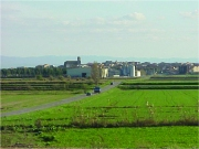 Panoràmica de Linyola